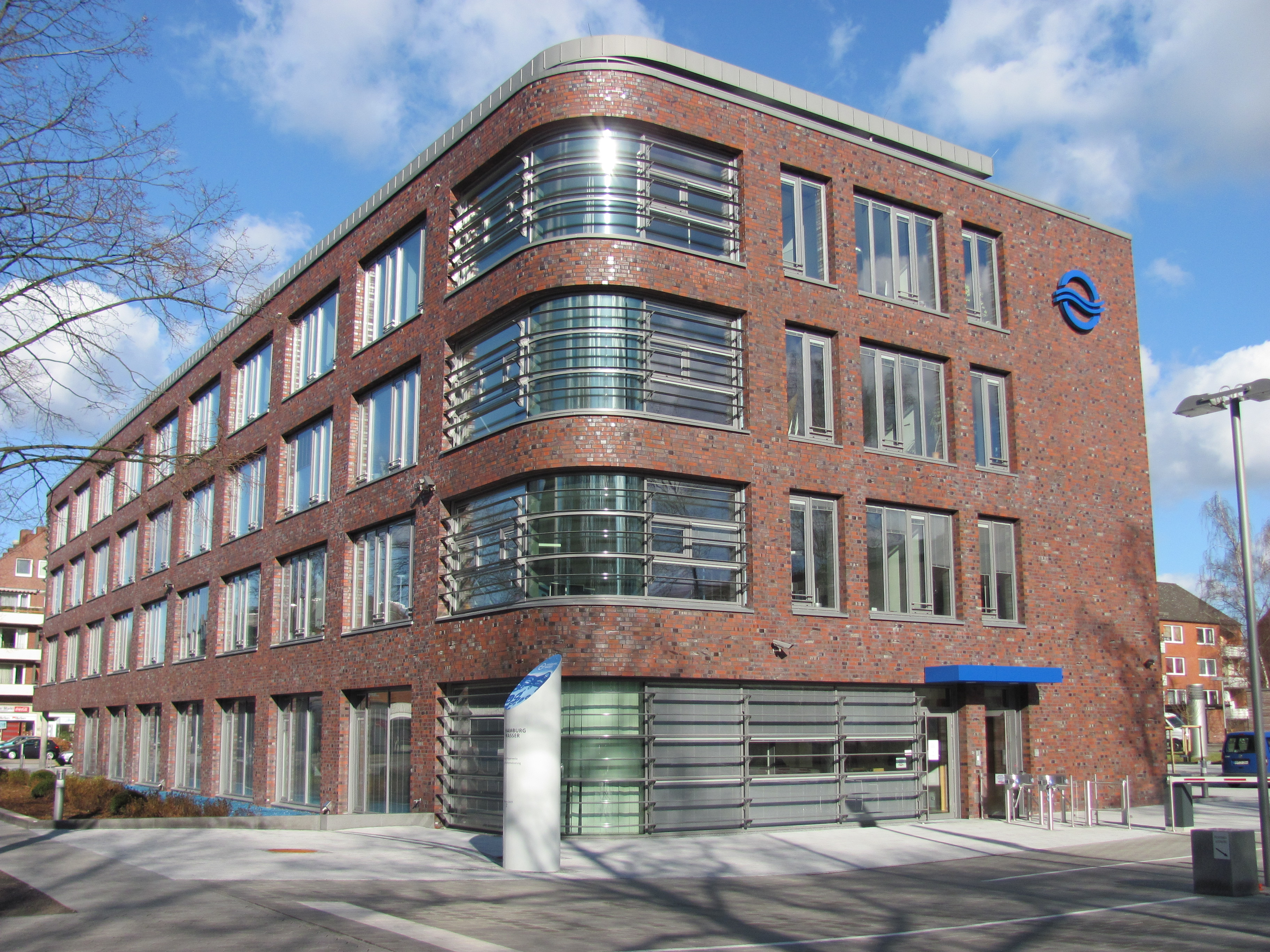 Hamburg Wasser, Billhorner Deich 2 in Hamburg-Rothenburgsort